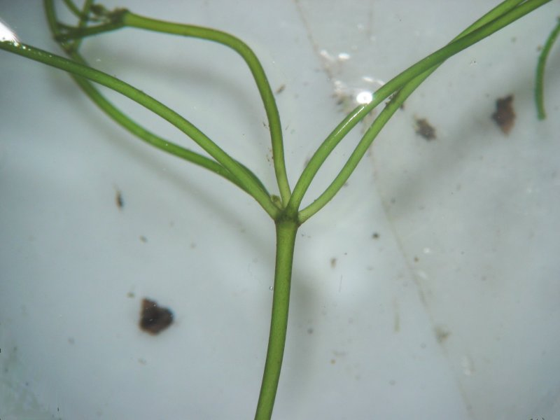 Stern-Armleuchteralge Nitellopsis obtusa, Müritz-Gebiet